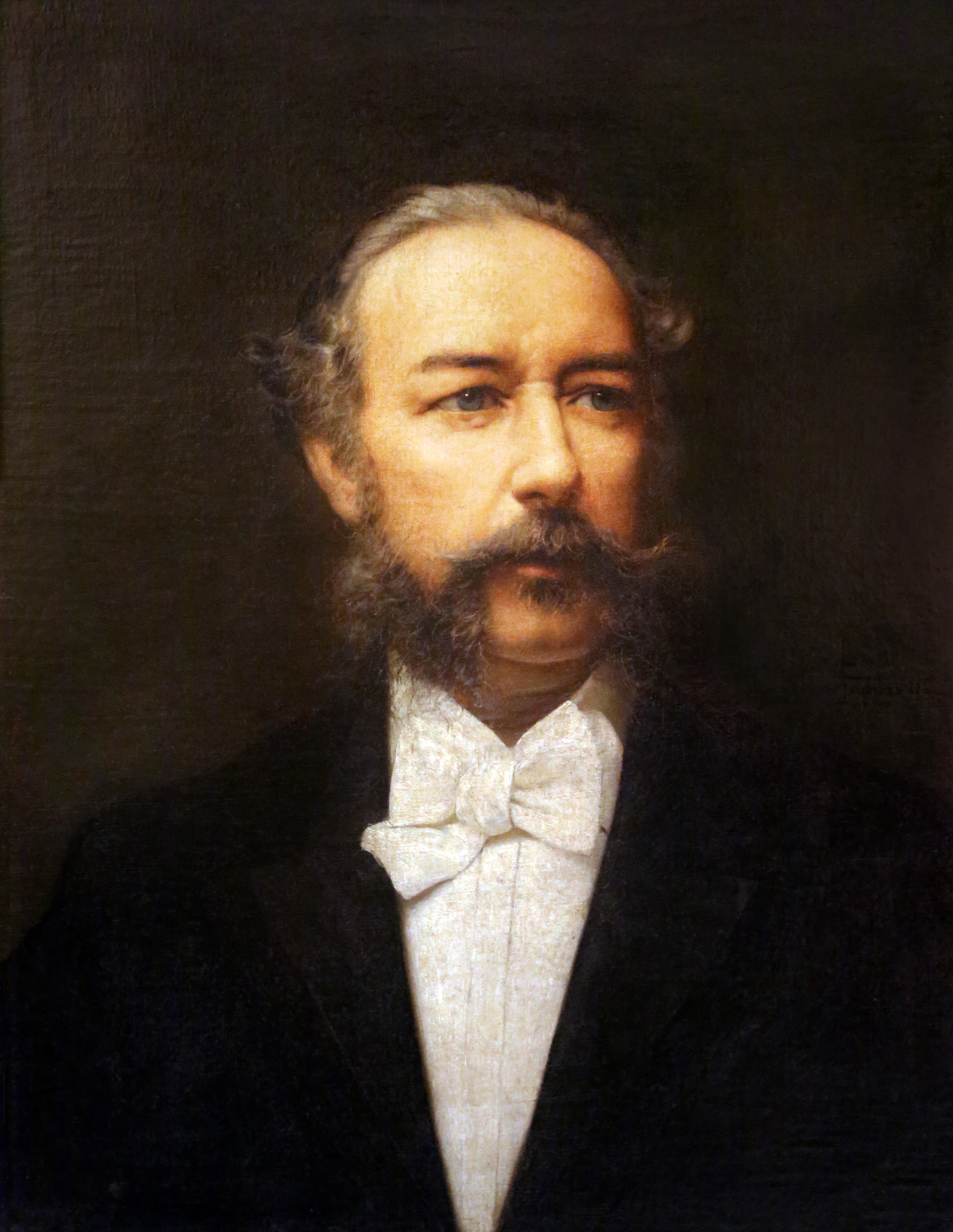 ritratto